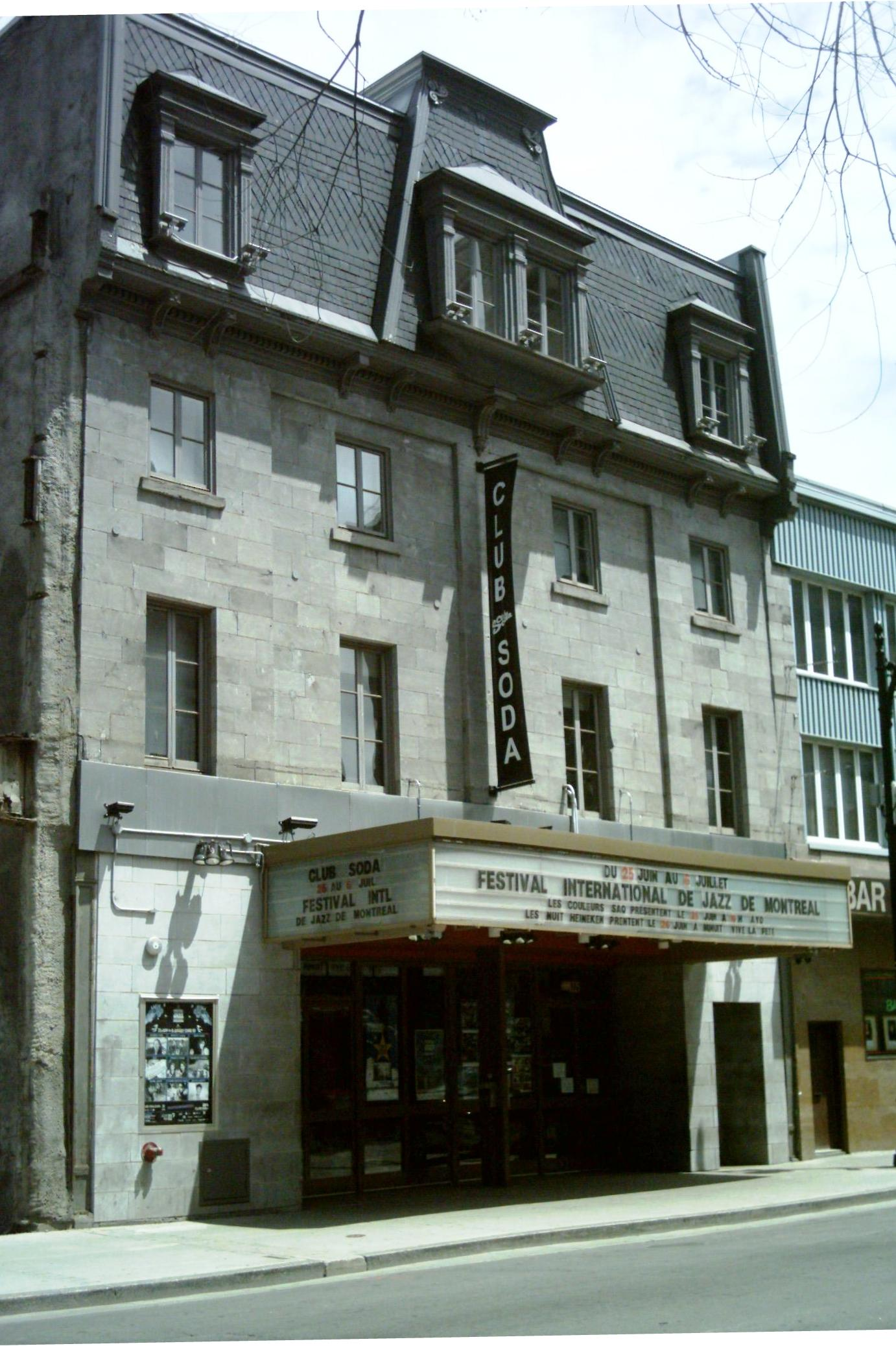 Le Club Soda est une salle de spectacle située sur le boulevard Saint-Laurent à Montréal.